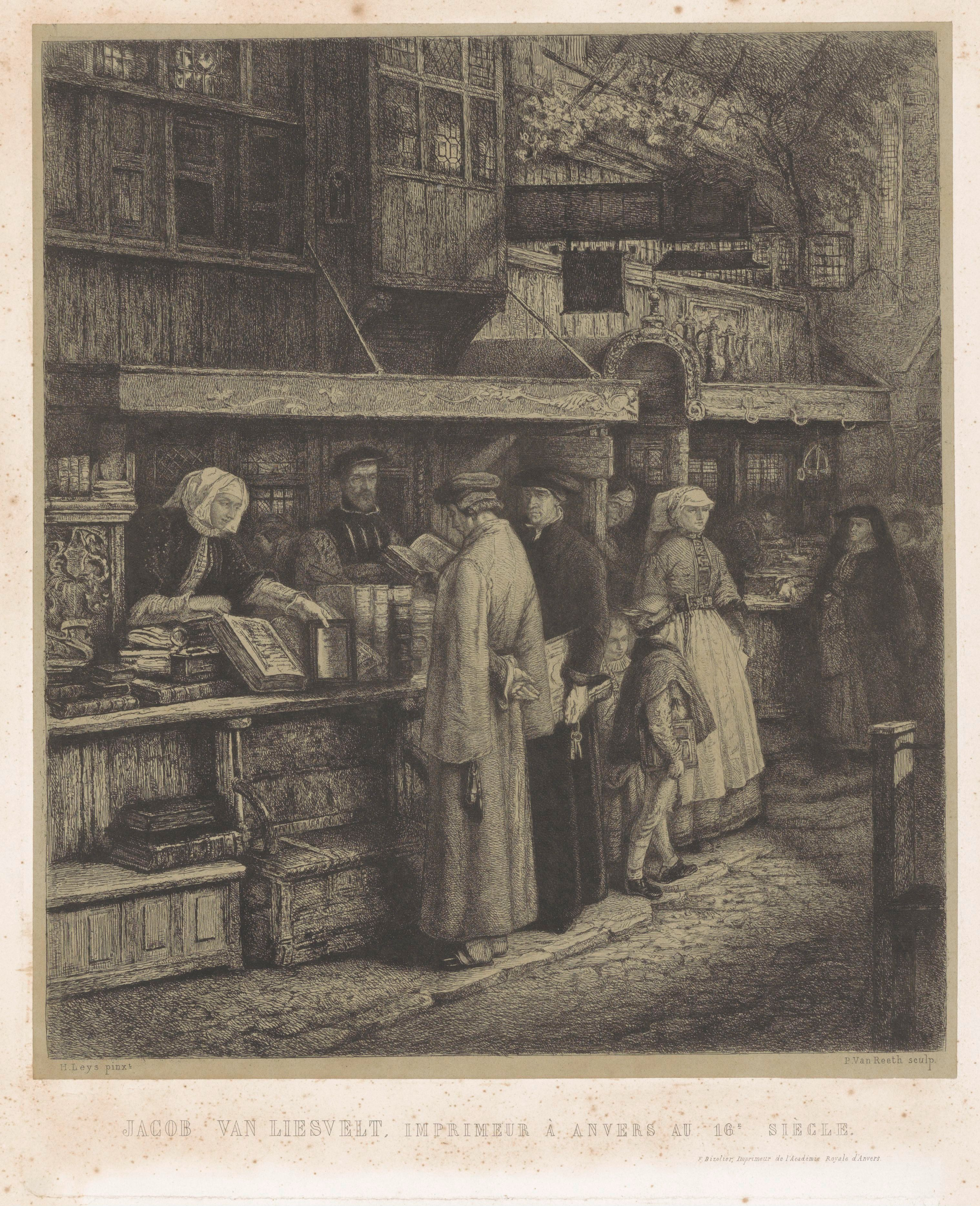 IdentificatieTitel(s): De boekhandel van Jacob van Liesvelt, zestiende eeuwJacob van Liesvelt, impimeur à Anvers au 16e siècle (titel op object)Objecttype: prent Objectnummer: RP-P-2015-26-1986Catalogusreferentie: FMH 397-BOpschriften / Merken: blindstempel, midden onder: ‘wt jonsten versaemt’, blindstempel met devies van de Antwerpse rederijkersverenigingverzamelaarsmerk, verso, gestempeld: Lugt 4780Omschrijving: Boekhandel of boekenstal Waar: achter de drukker Jacob van Liesvelt en zijn vrouw boeken te koop aanbieden. Enkele geestelijken bekijken een boek.VervaardigingVervaardiger: prentmaker: Pierre Jean-Baptiste van Reeth (eigenhandig gesigneerd)naar schilderij van: Henri Leys (baron) (vermeld op object)drukker: F. Bizolier (vermeld op object)Plaats vervaardiging: AntwerpenDatering: 1832 - 1866Materiaal: chine collé papier Techniek: etsenAfmetingen: plaatrand: h 371 mm × b 290 mmOnderwerpWat: book-stall, kioskNederland onder de HabsburgersWaarAntwerpenWie: Jacob van LiesveltVerwerving en rechtenCredit line: Legaat van de heer S. Emmering, AmsterdamVerwerving: legaat 2000Copyright: Publiek domein